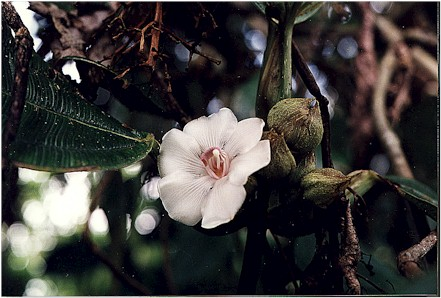 Un bonito ejemplar de Blakea eriocalyx blanca